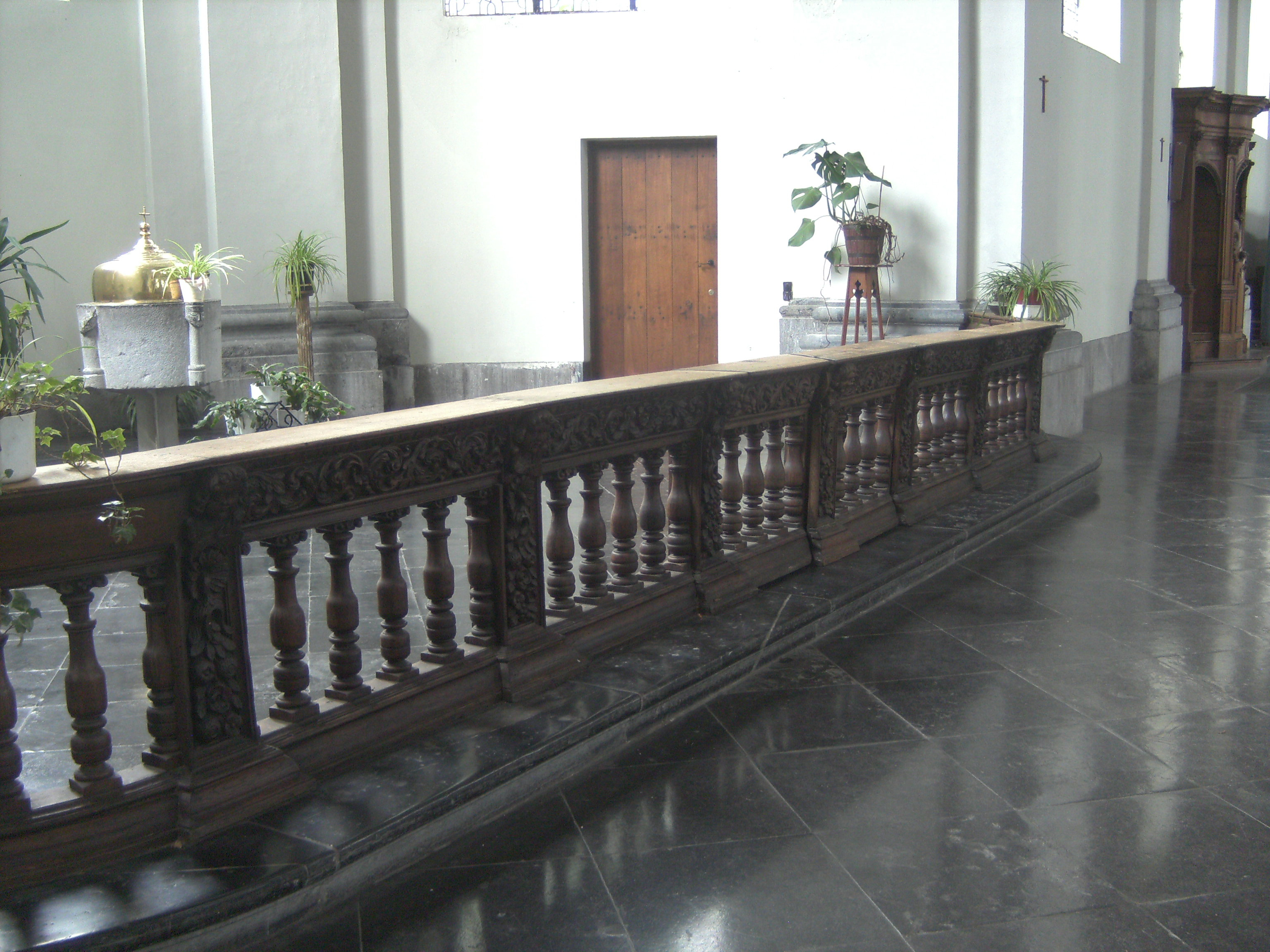 Jumet (Charleroi - Belgique) - Église Saint-Sulpice